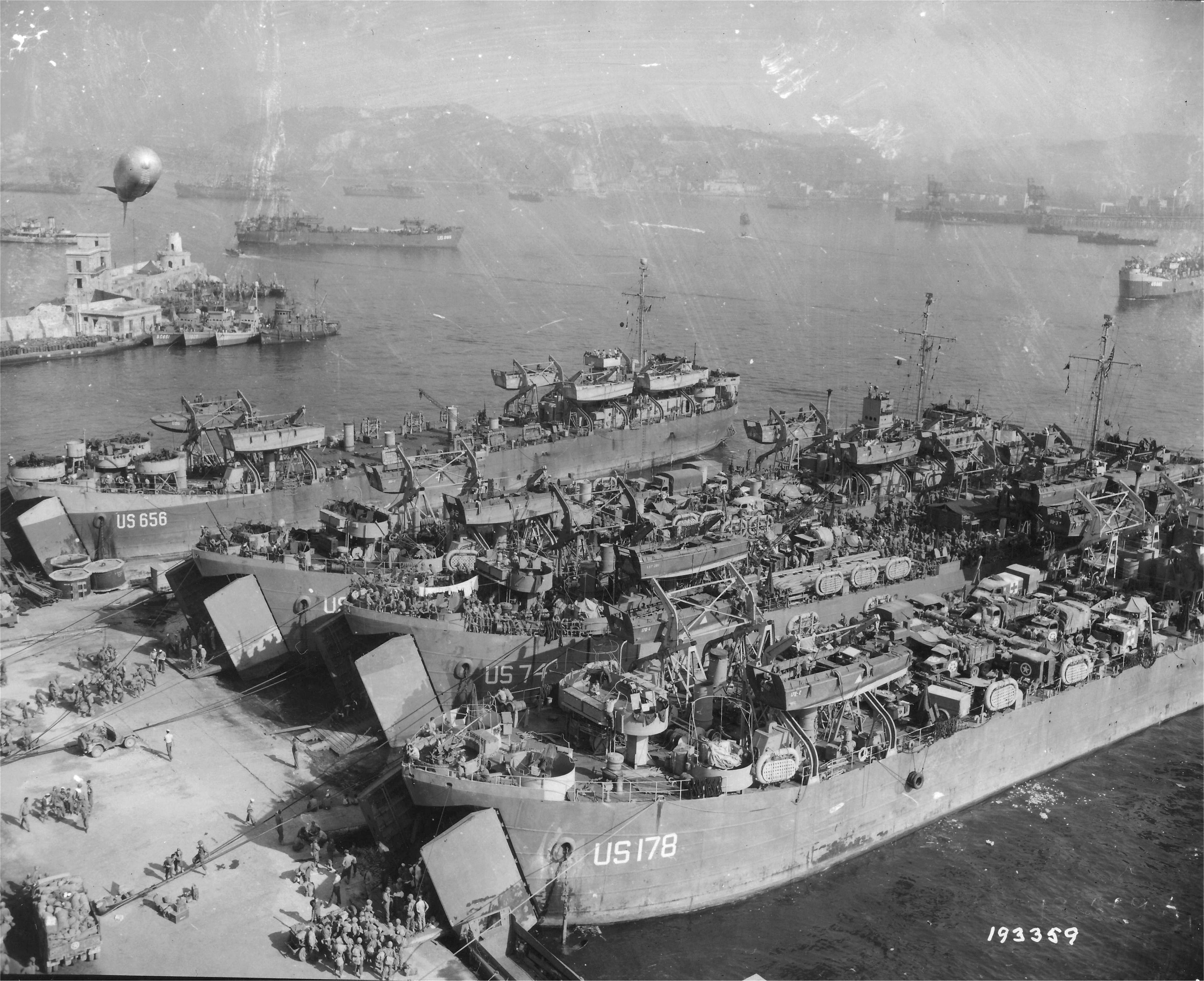 Napoli, spiaggia di Coroglio presso Nisida - Navi da guerra in attesa di partire per lo sbarco in Provenza (Operazione Dragoon).